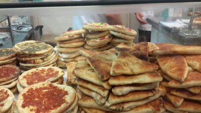 غذاهای لبنانی